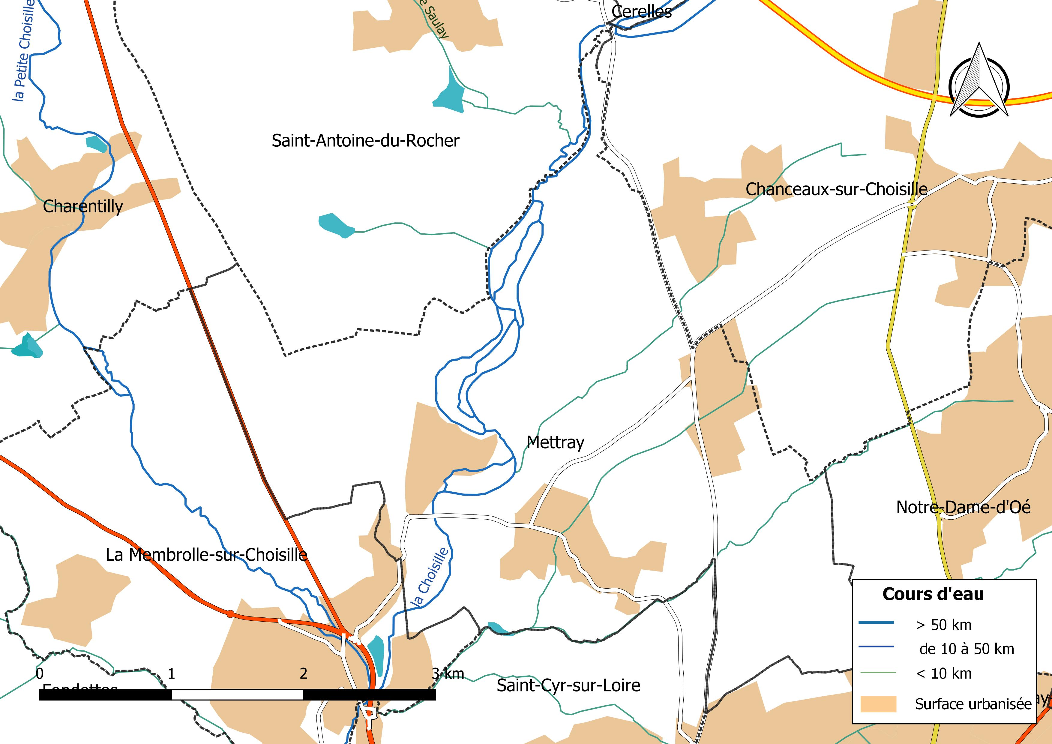 Carte du réseau hydrographique de la commune de Mettray (France).